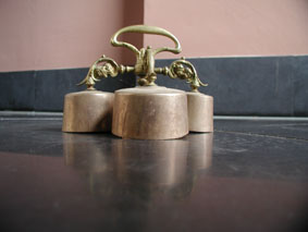 zelf gemaakt